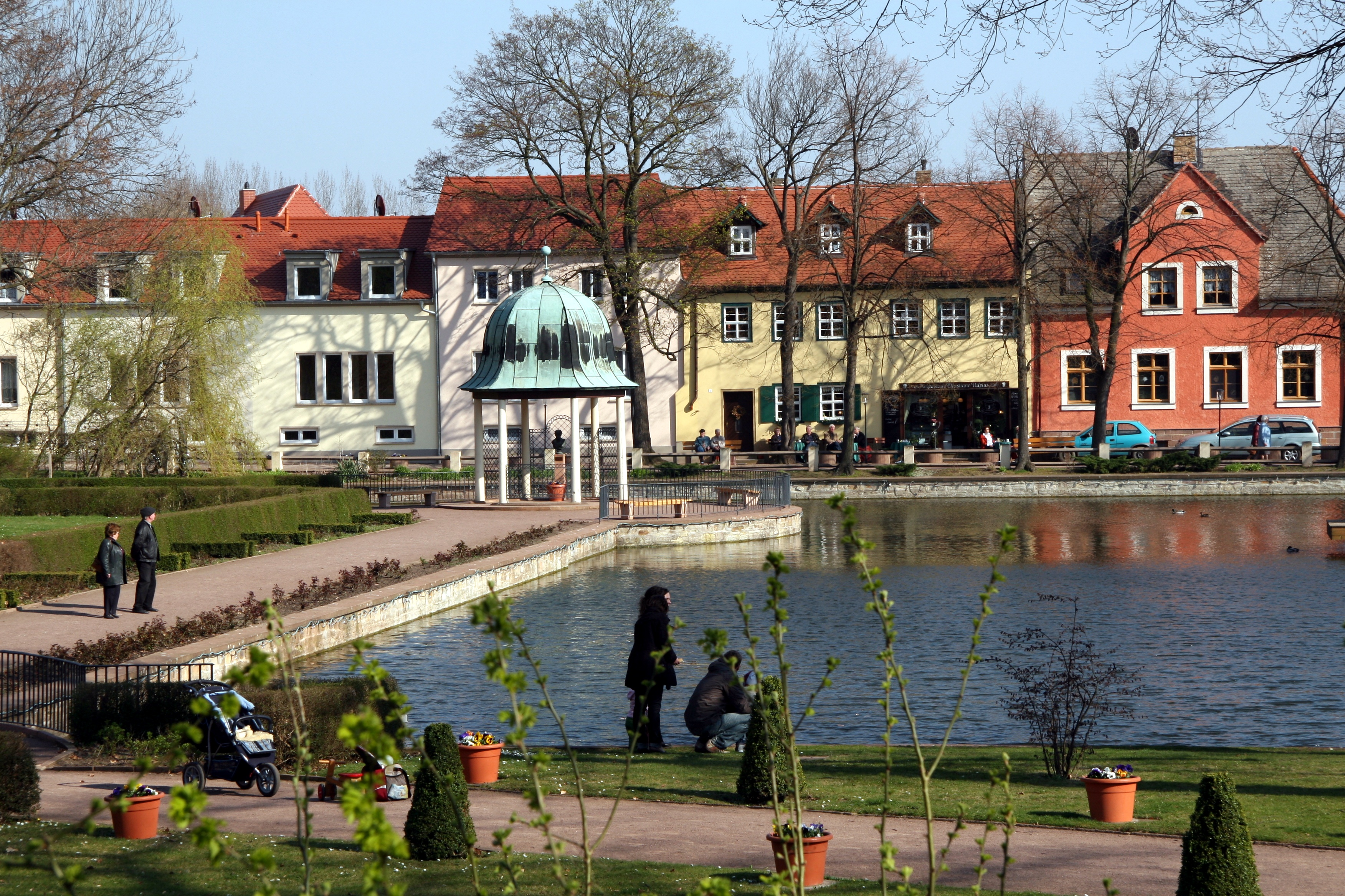 Bad Lauchstädt